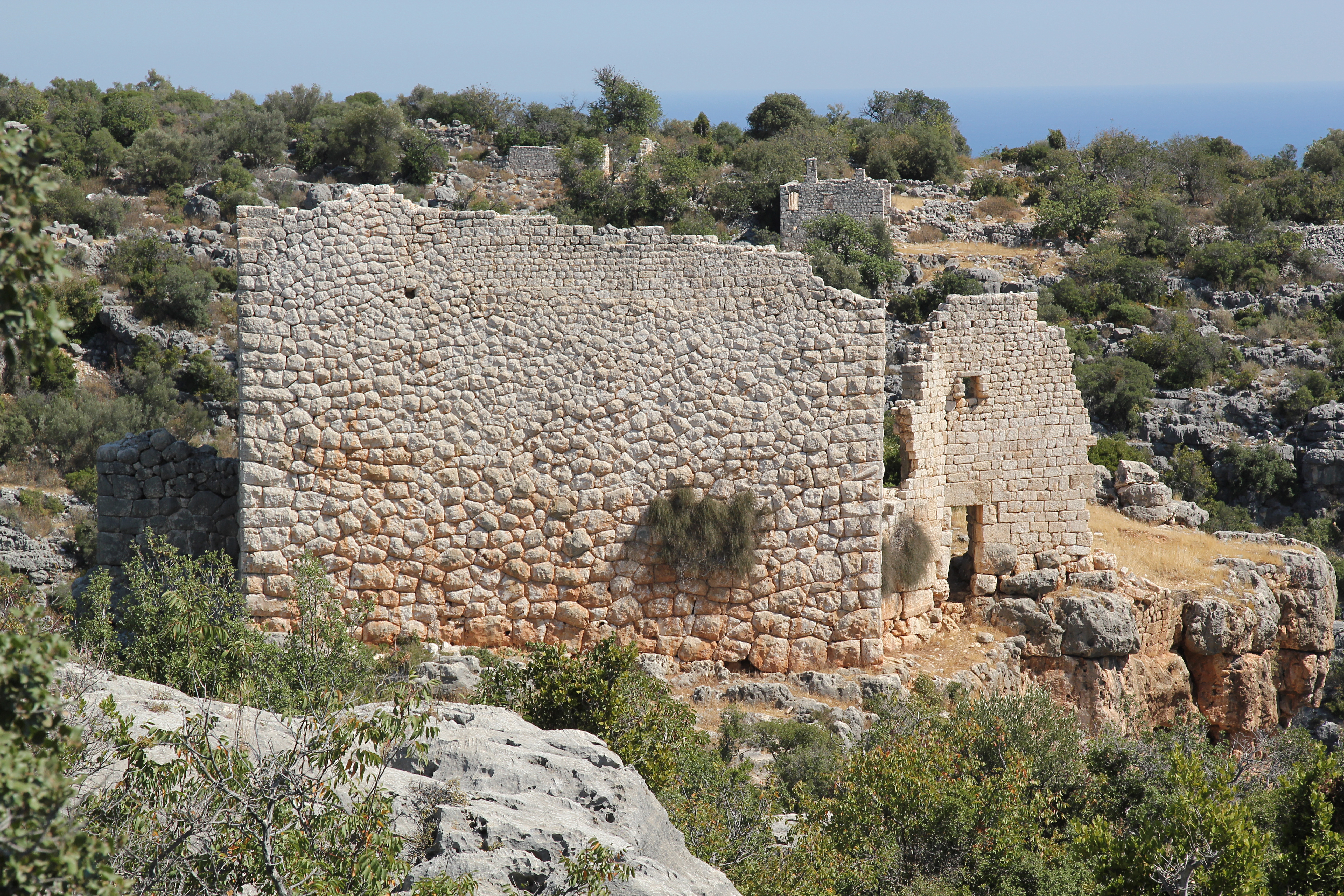 Hisarın, römisch-frühbyzantinische Siedlung im Rauhen Kilikien, Südtürkei, Befestigungsanlage von Westen